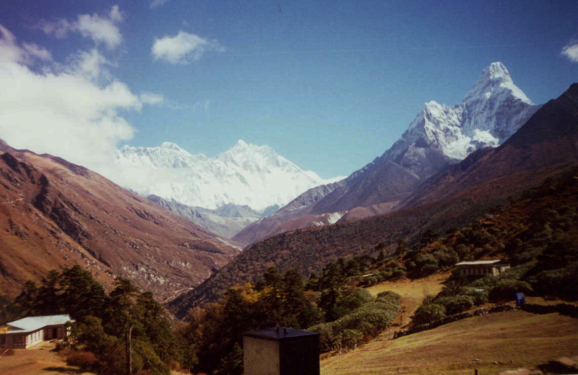 Вид с монастыря ТенгбочеВид на Лхотсе, Эверест и Аму Даблан со стороны монастыря Тенгбоче, Непал